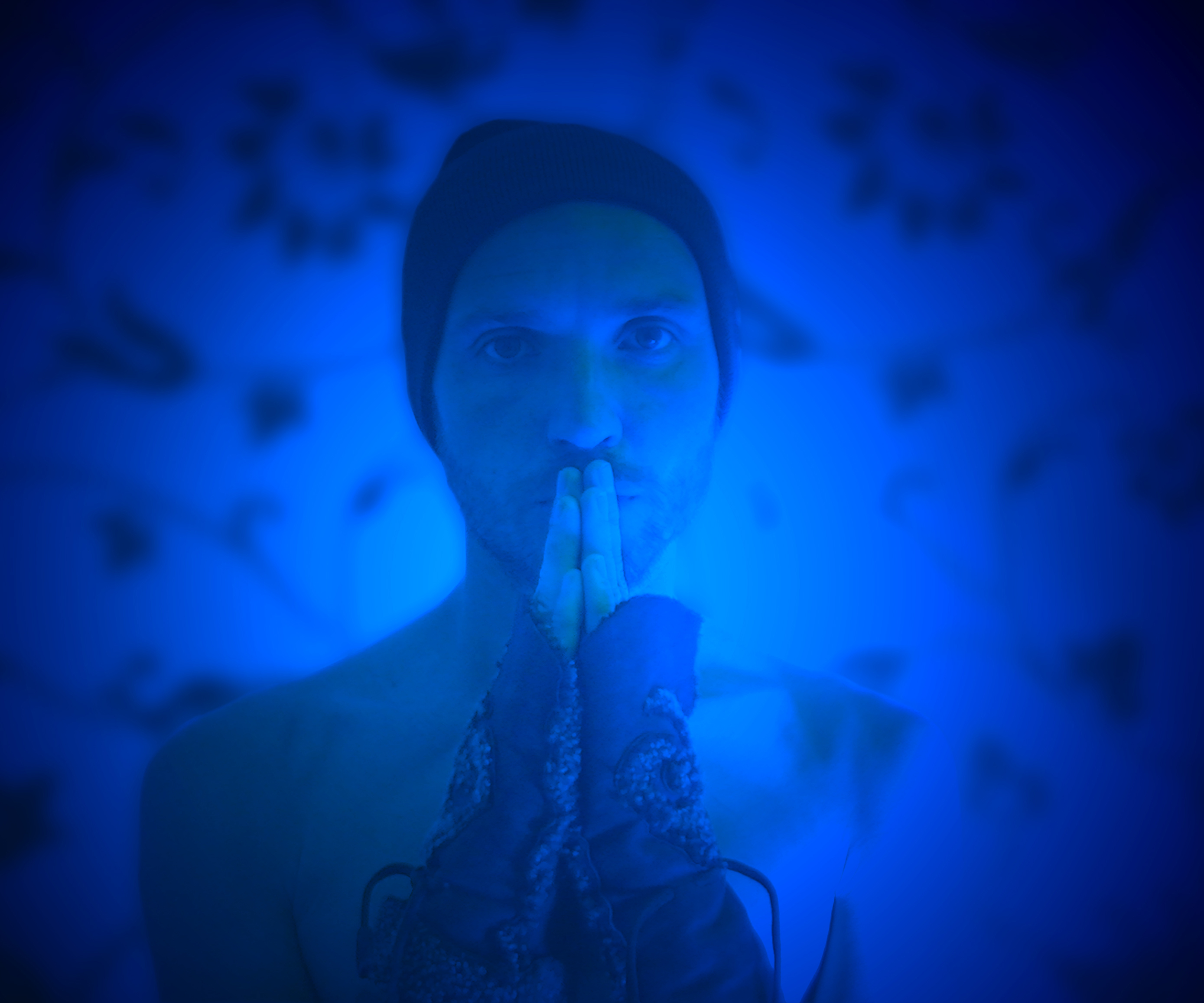 Ewian Christensen bei einem Photoshooting im Jahre 2014 für das Album "Good Old Underground".